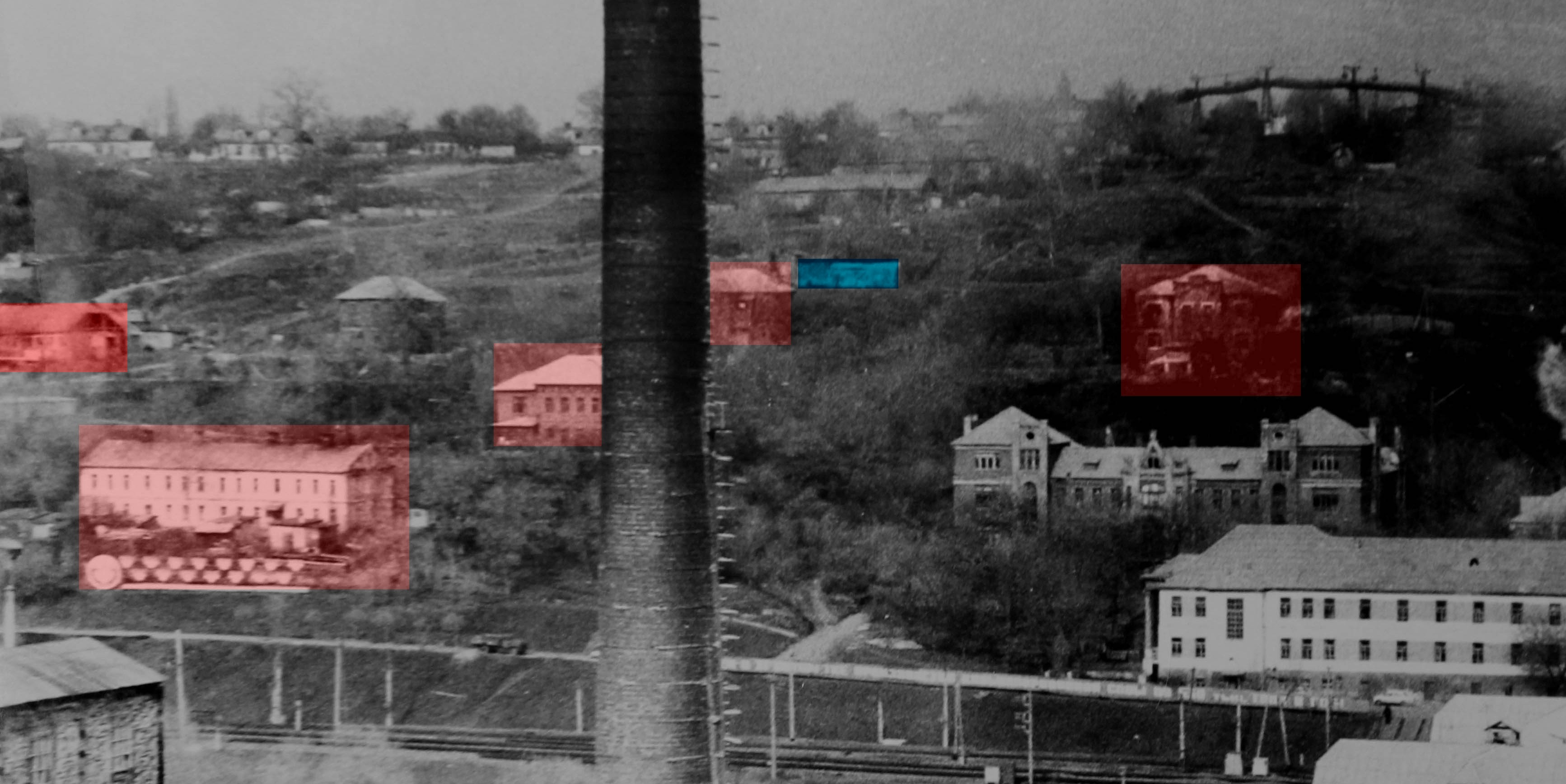 втрачена бельгійськf спадщина